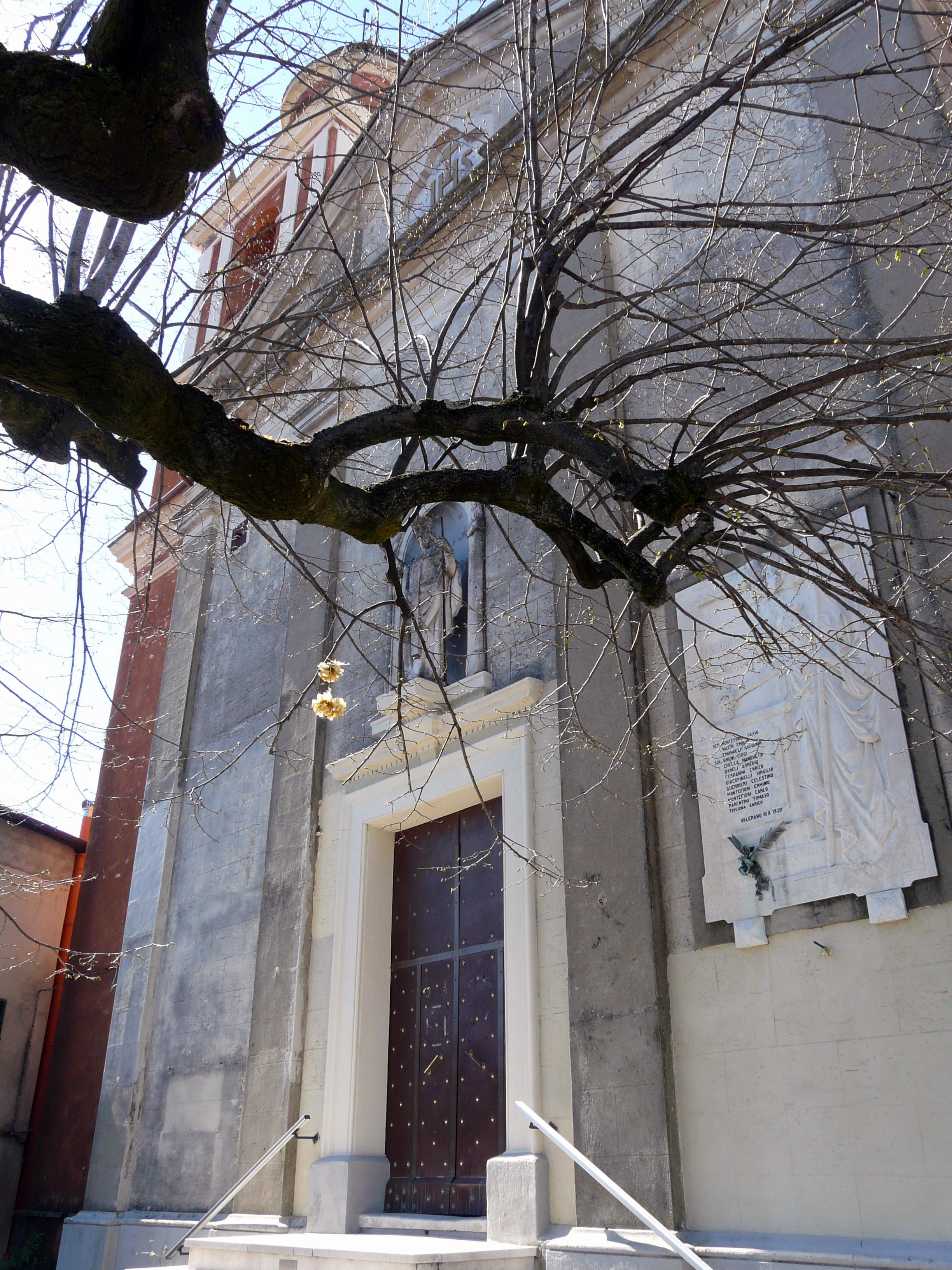 Chiesa di Sant'Apollinare, Valeriano, Vezzano Ligure, Liguria, Italia